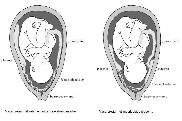 twee vormen van vasa previa